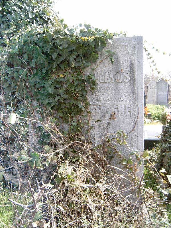 Mezőfi Vilmos (Debrecen, 1870. március 27. – Budapest, 1947. április 16.) újságíró, politikus sírja Budapesten. Kozma utcai zsidó temető: 5B-10-20.